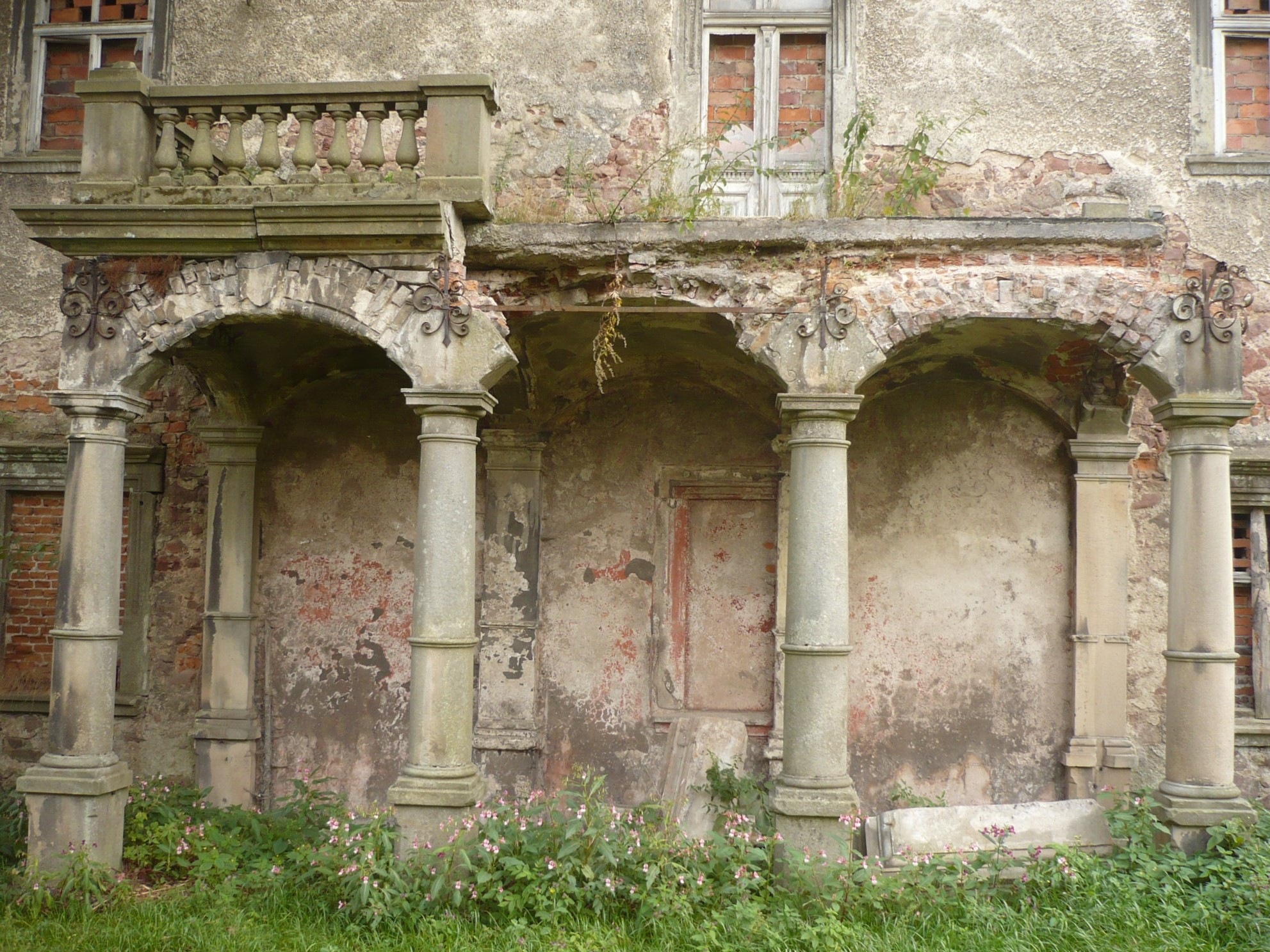 Sarny. Portyk